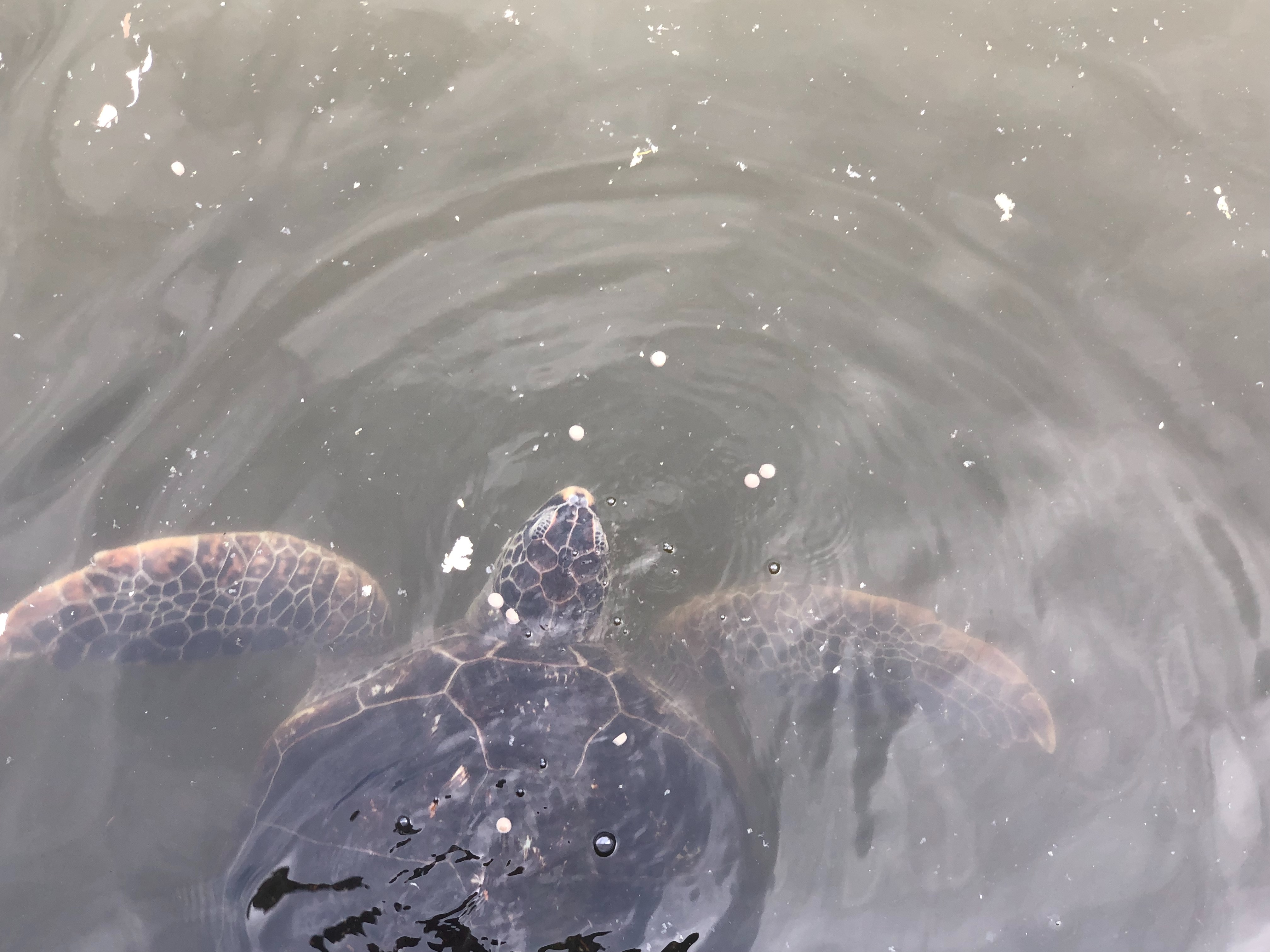 我的图片图片图片